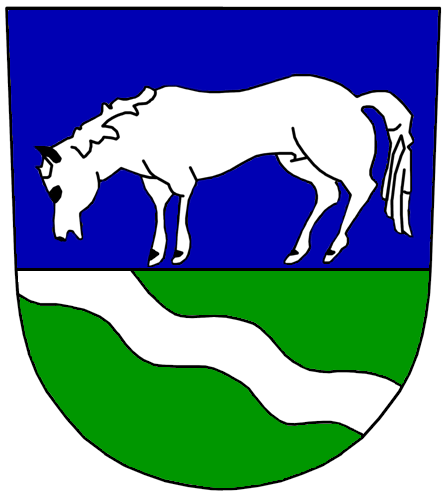 Jde o mluvicí znamení, vycházející z německého názvu města - Rossbach (něm. Ross=kůň, Bach=potok).